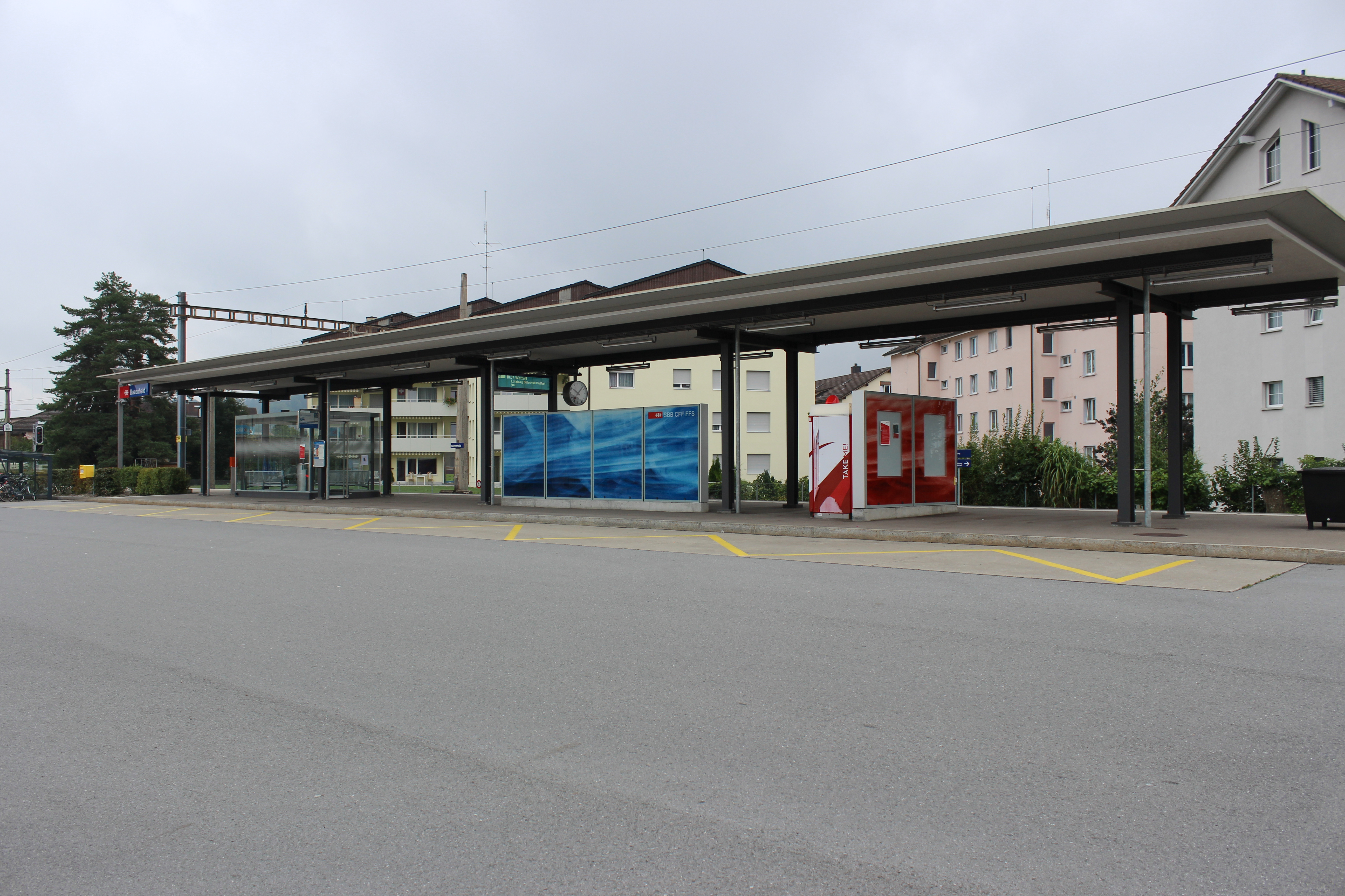 Bahnhof Bazenheid, Schweiz aus Richtung West